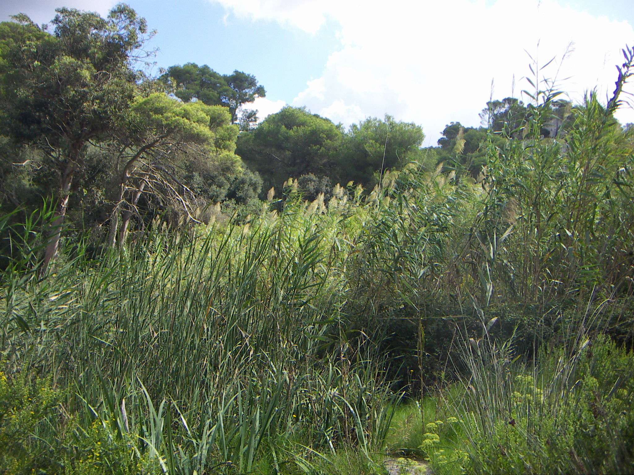 Flora de Macarella (Menorca)